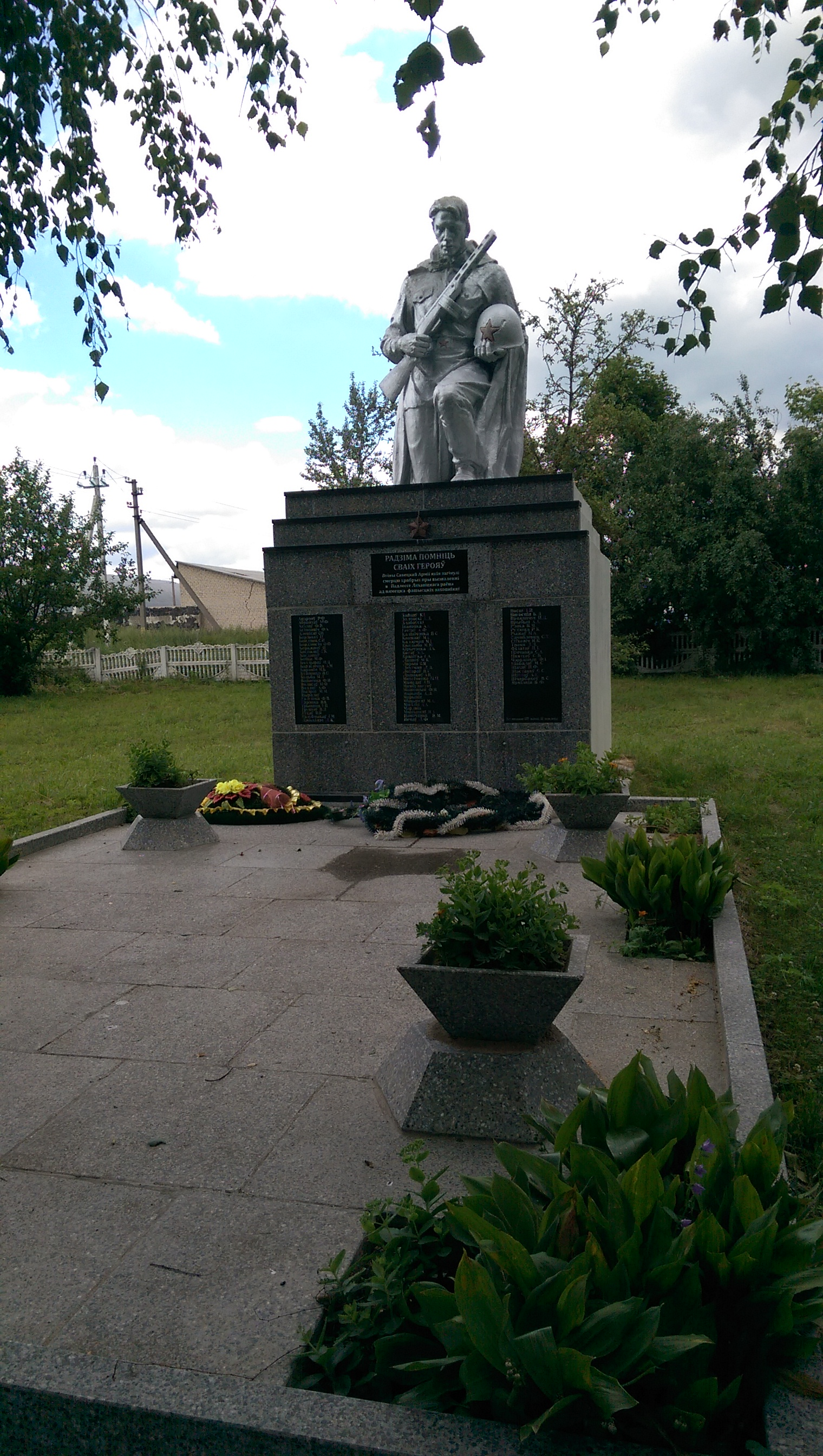 Ваенны мемарыял у Падлессі, Ляхавіцкі раён.